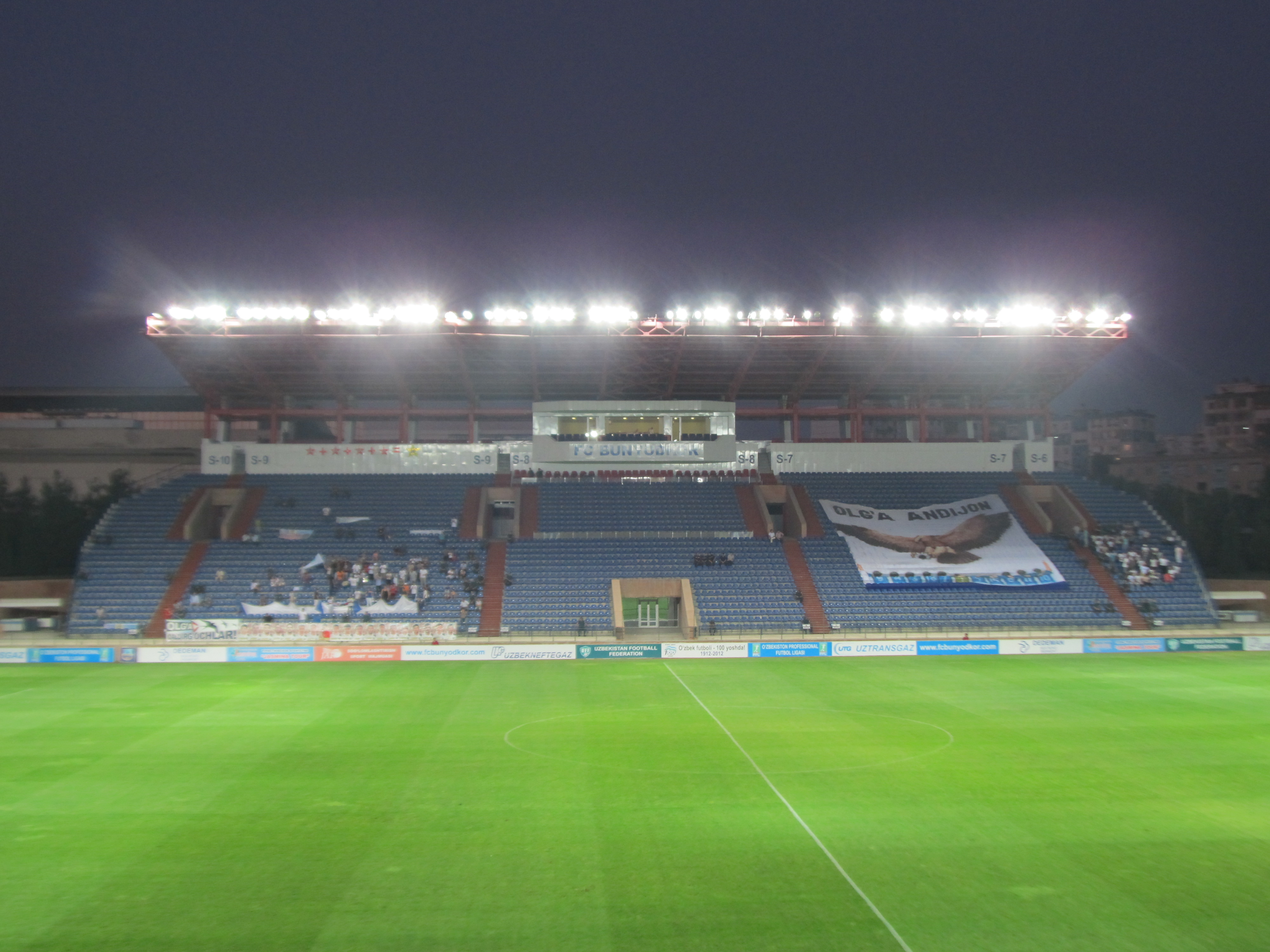 Матч "Бунедкор" - "Андижан" 04.08.2012